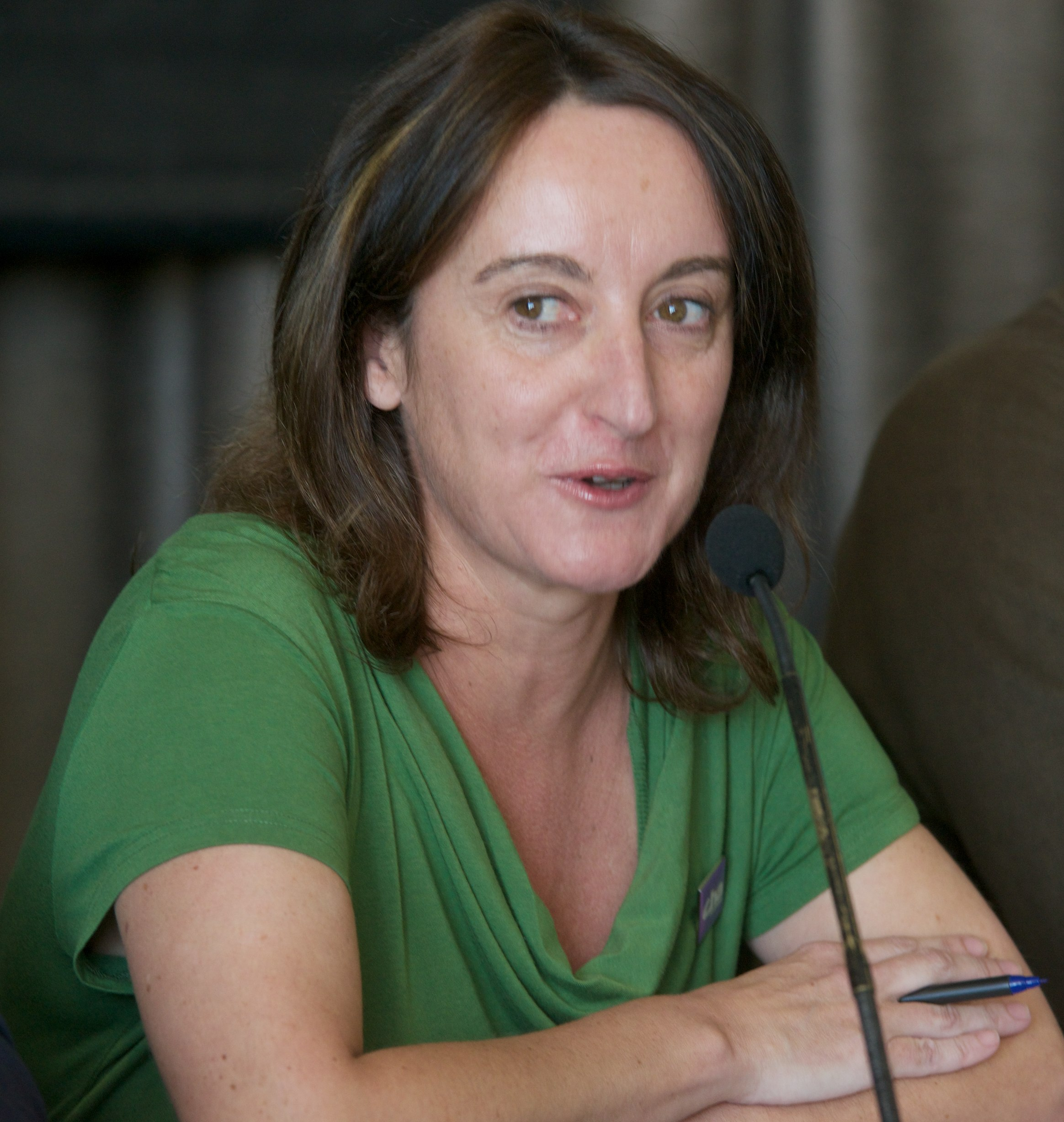 GLB_6072